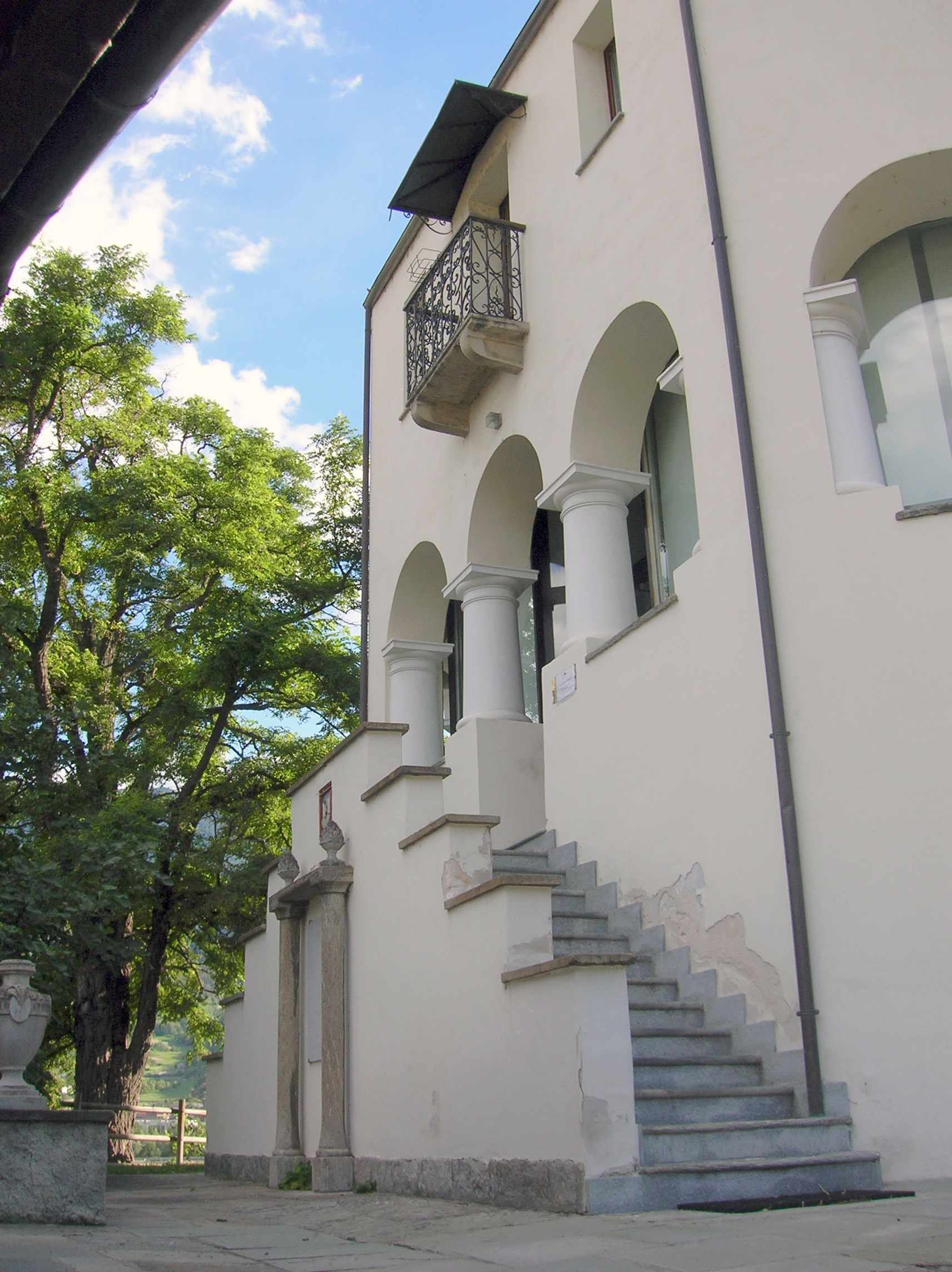 La scalinata voluta dal canonico Loye, degli anni cinquanta. Castello di Montfleury, Aosta, Valle d'Aosta, Italia.